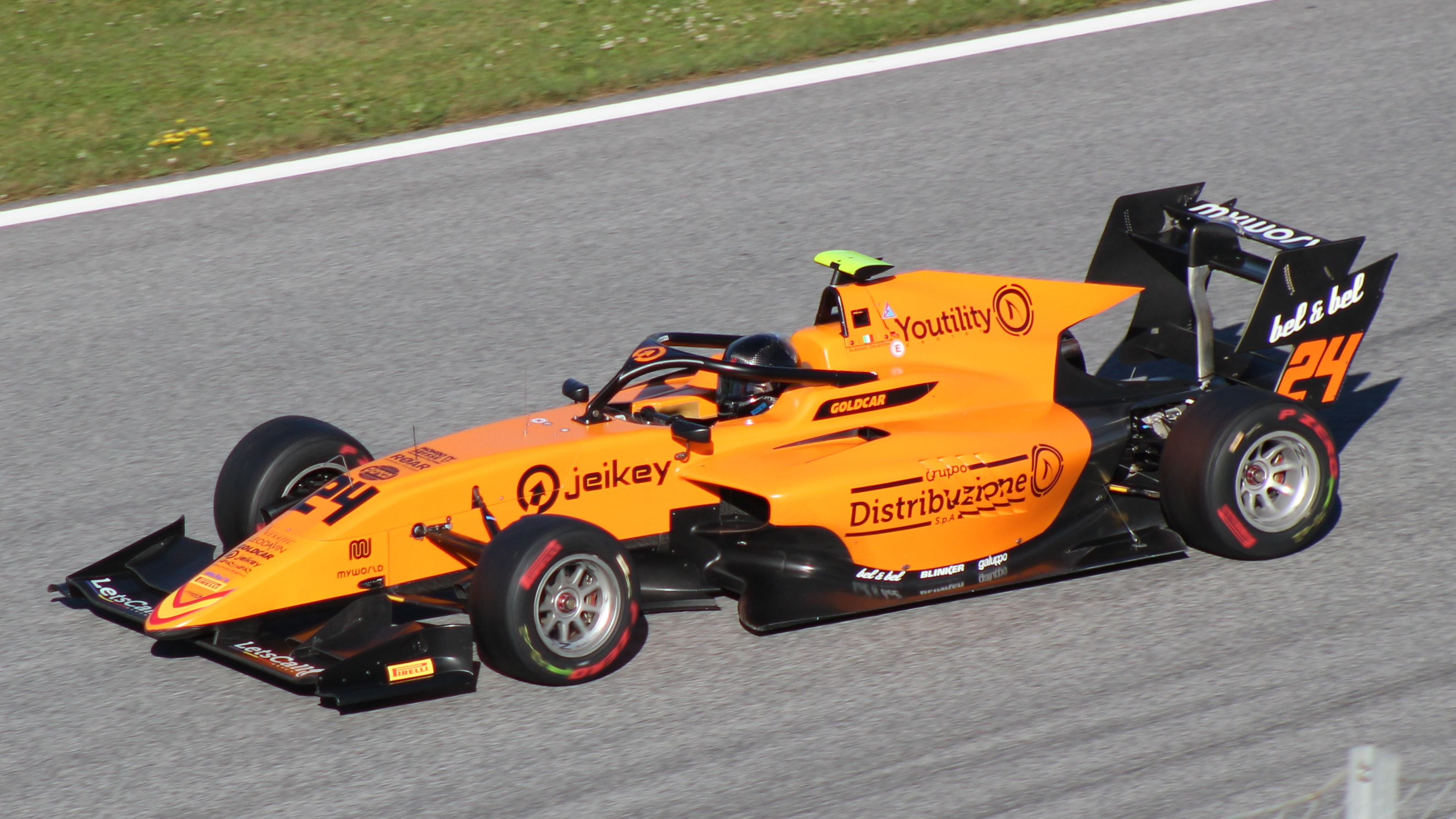 Deledda beim Rennwochenende in Österreich 2019